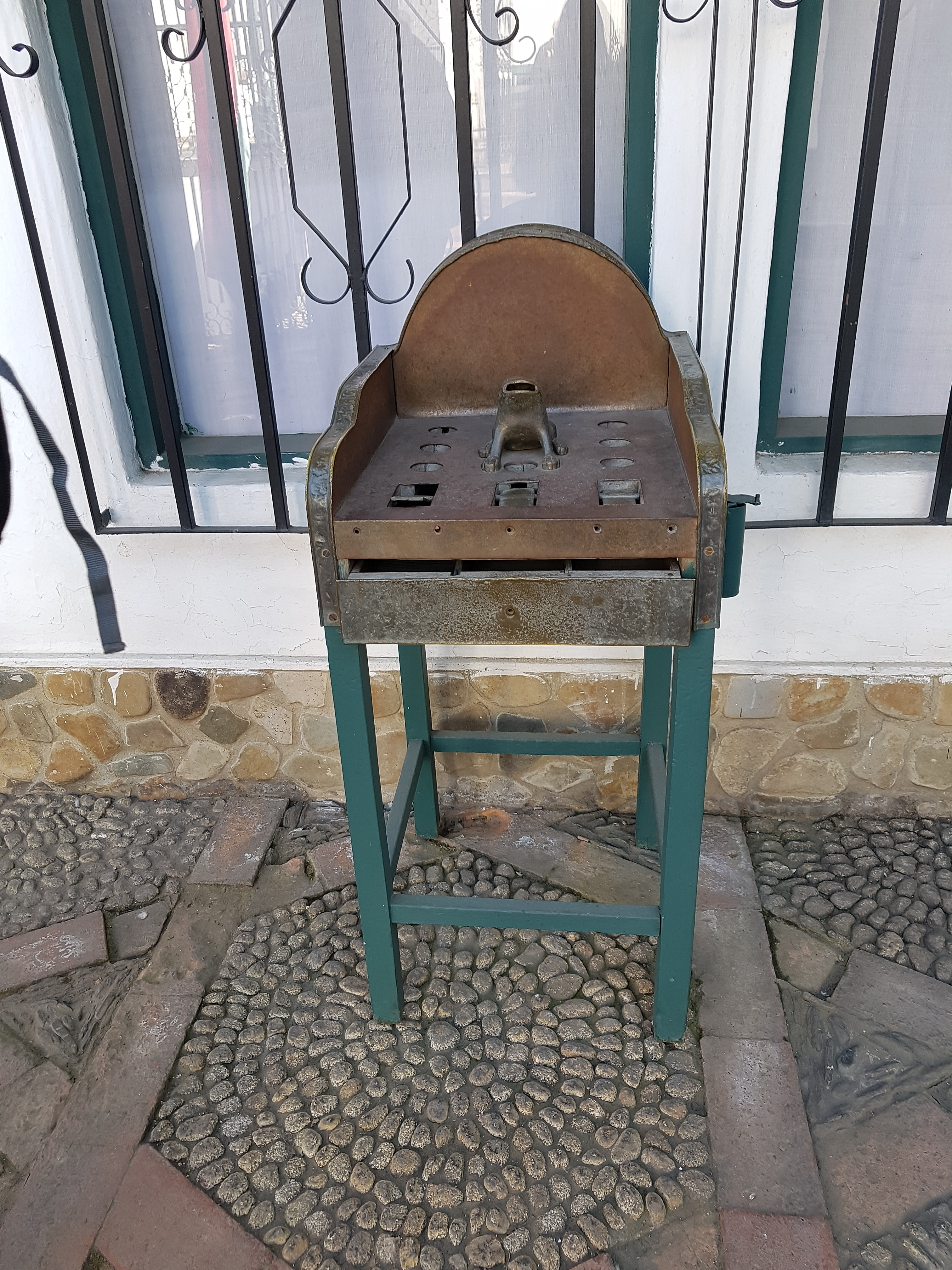 Museo Costumbrista This medium shows the protected monument with the number L/00-032 in Bolivia.